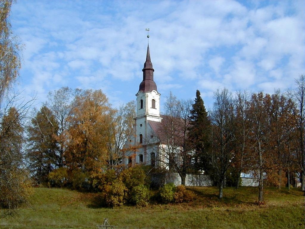 Lēdurgas luterāņu baznīca 2000-10-07